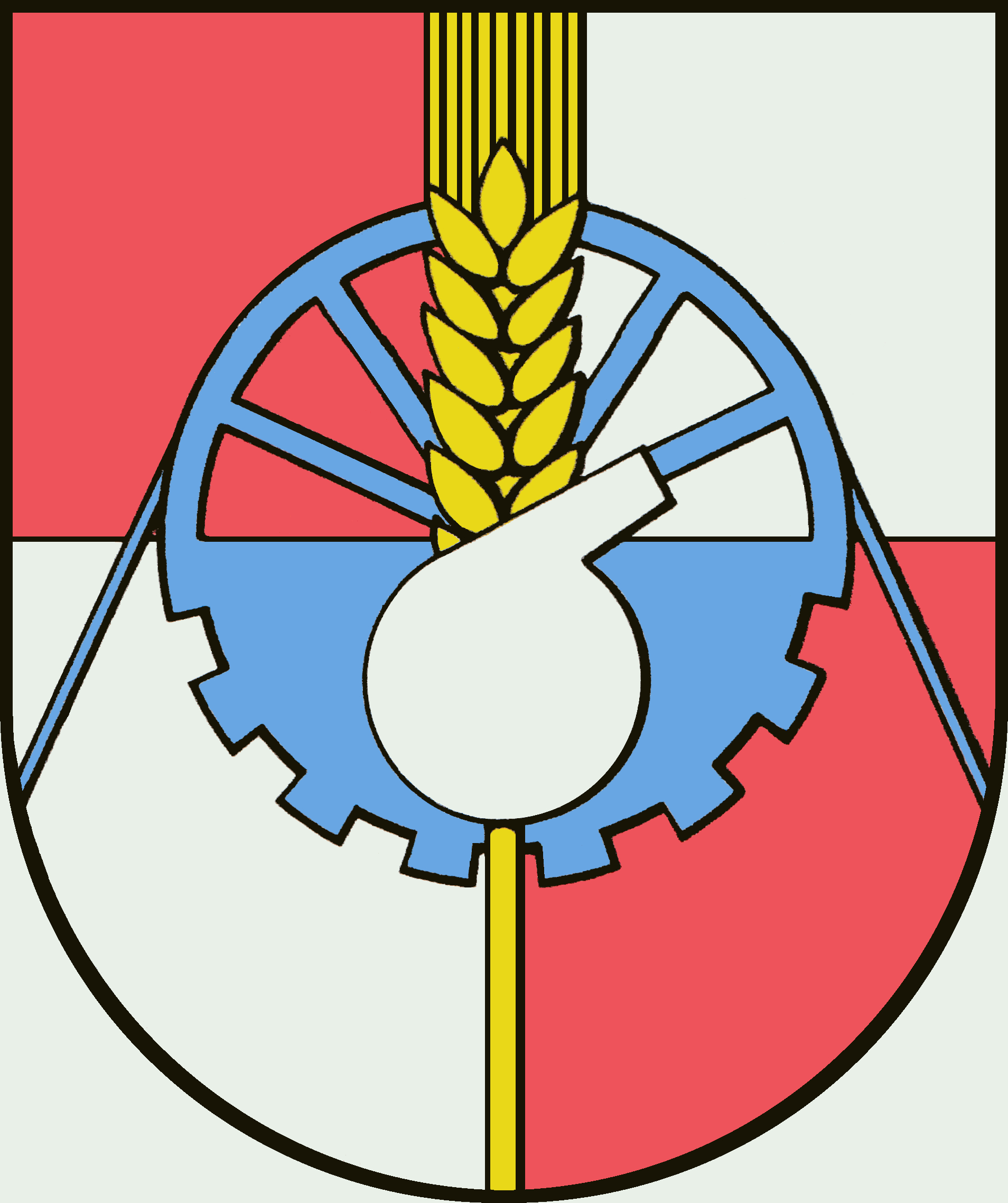 Staßfurt Stadtwappen 1960-1990